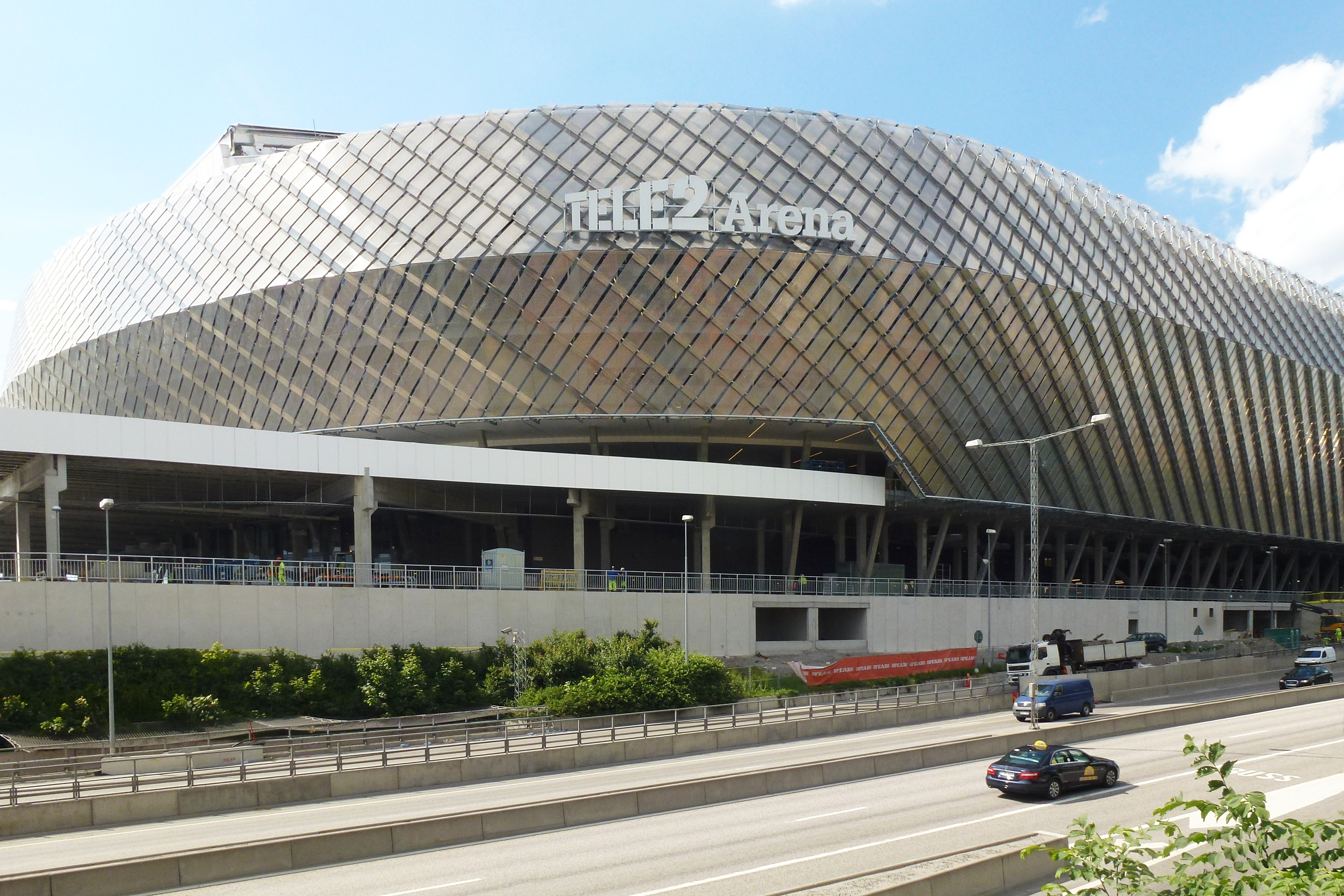 Tele2 Arena den 25 juni 2013